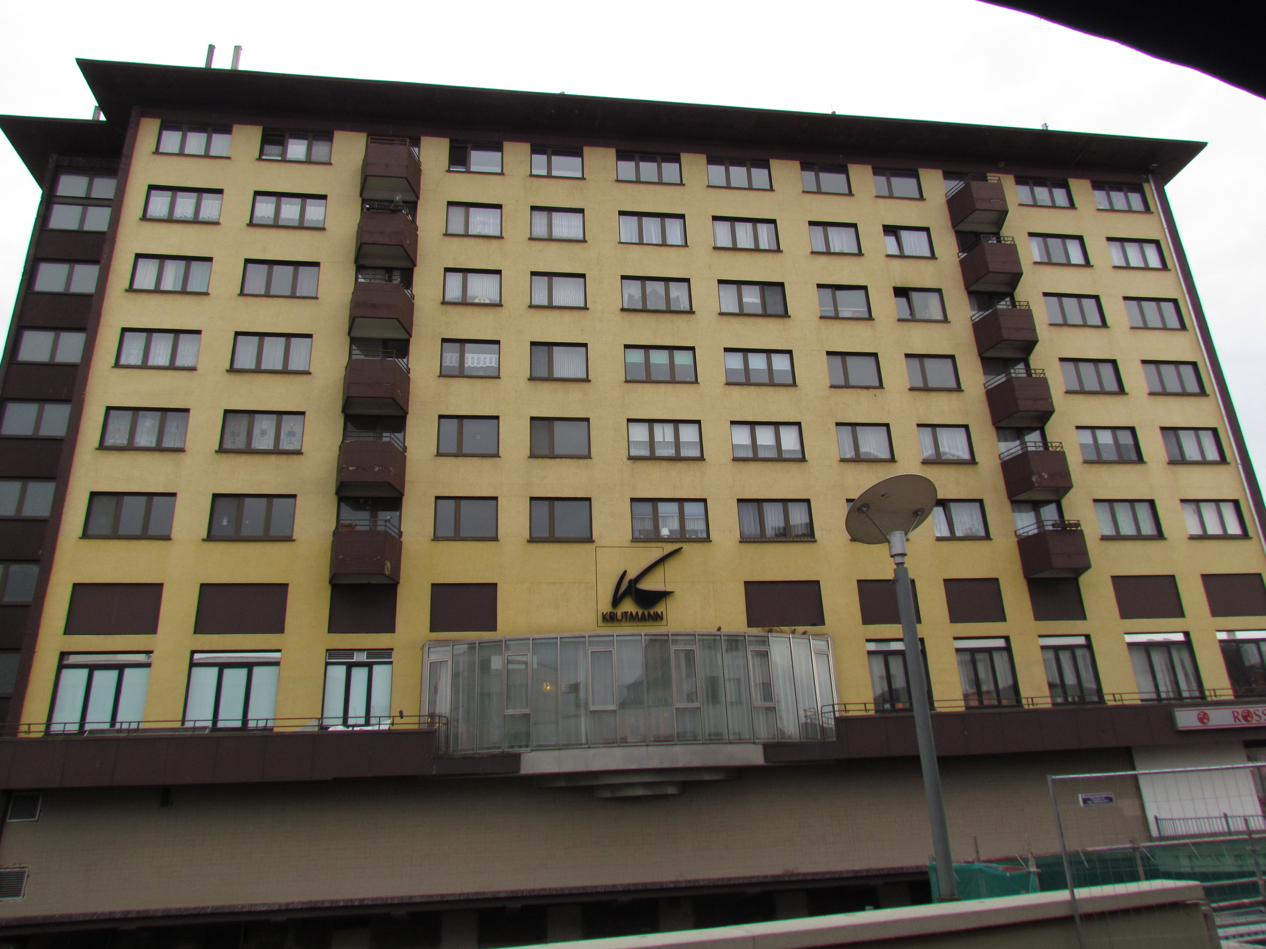 Bildinhalt: Das Corona.Haus, Bahnhofstraße 51-53, von der Blies-Seite aus betrachtet Aufnahmeort: Neunkirchen, Saarland